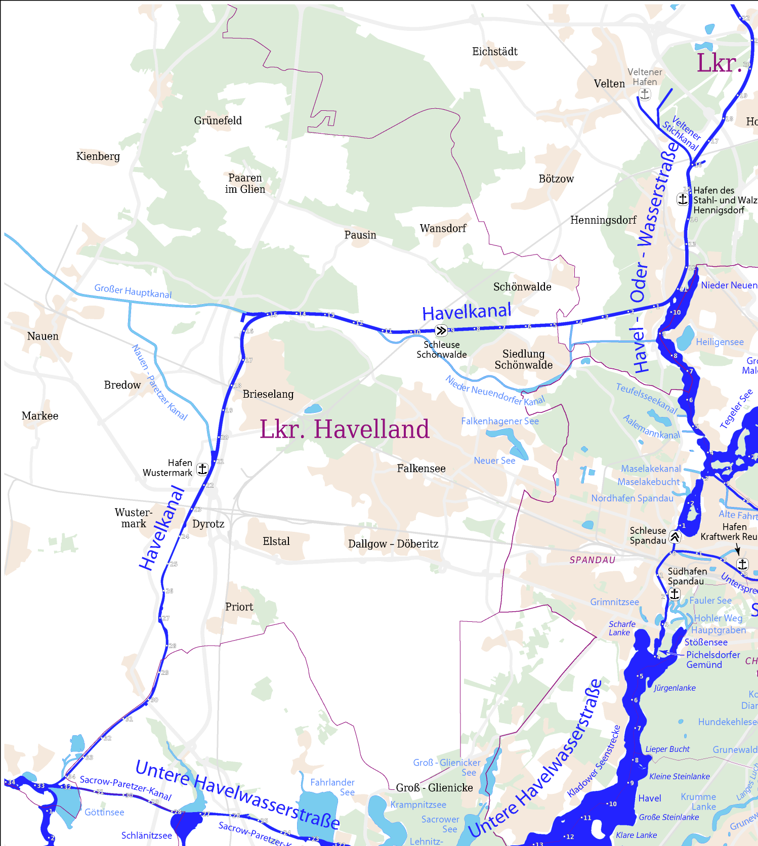 Auszug aus Karte der Wasserstraßen in Berlin